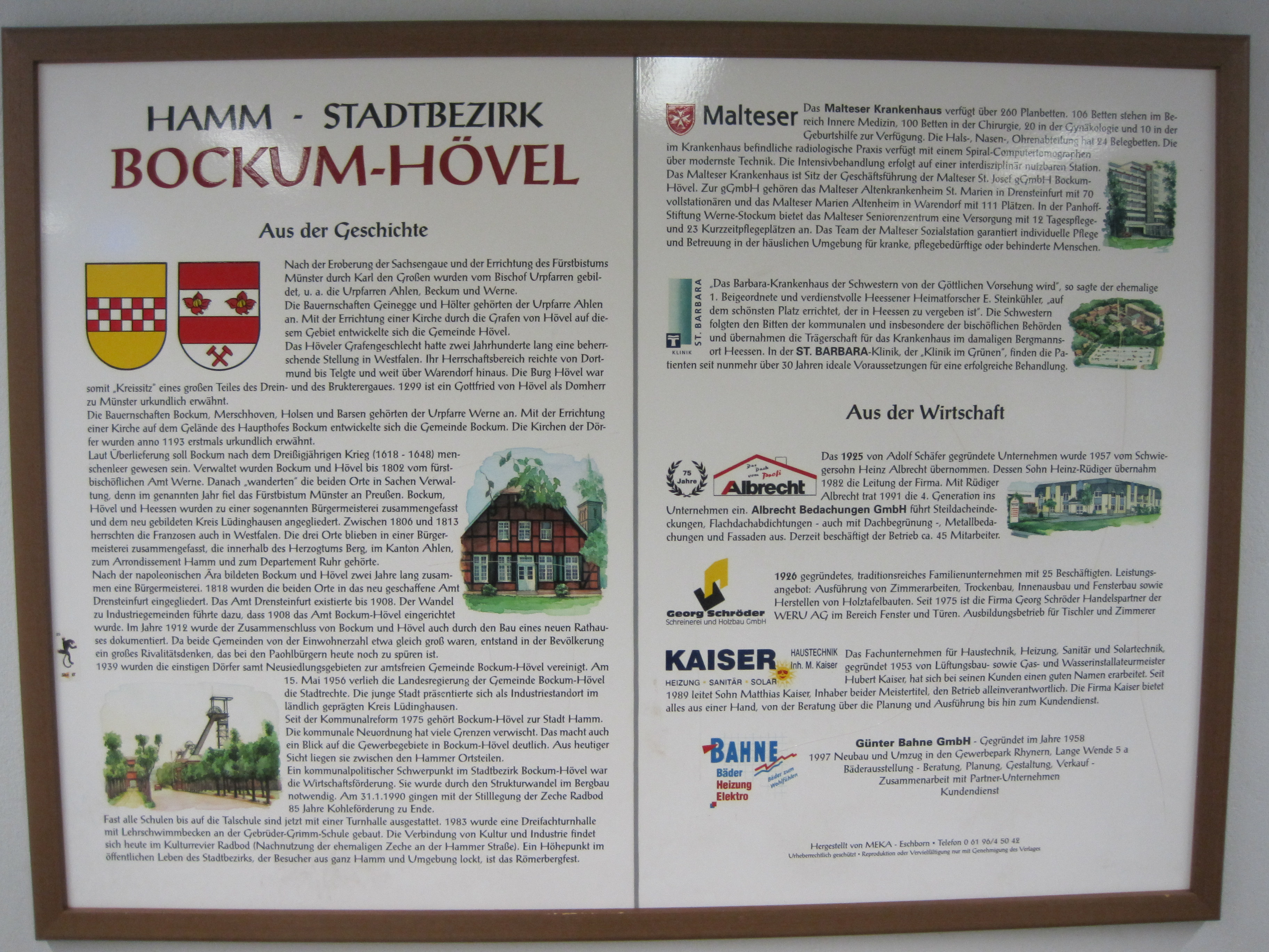 Das Foto zeigt eine kurze Geschichte von Bockum-Hövel, ausgestellt im Rathaus Bockum-Hövel.